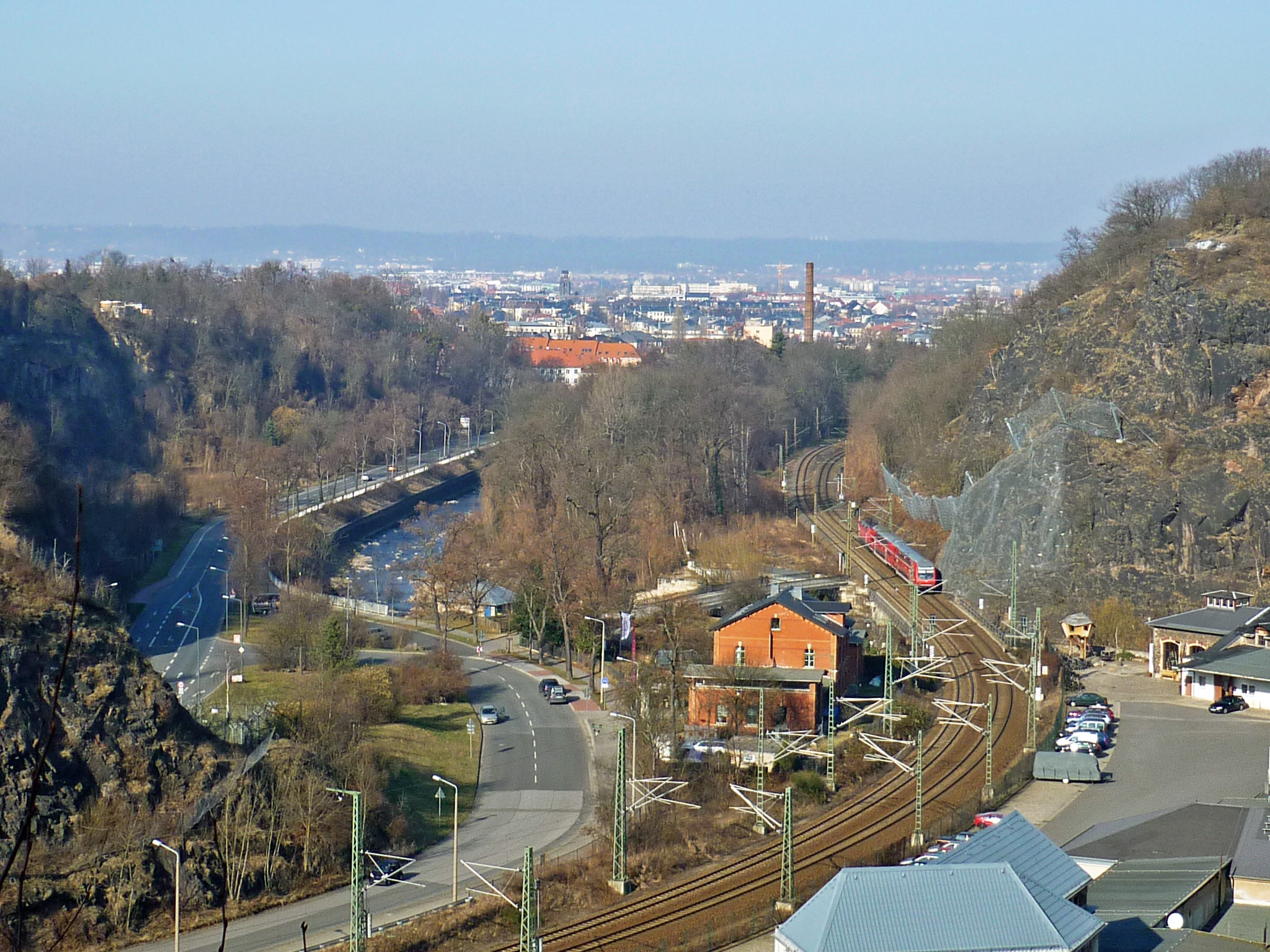 Blick über die ehemalige Felsenkeller-Brauerei im Plauenschen Grund in Dresden in Richtung Dresden-Plauen